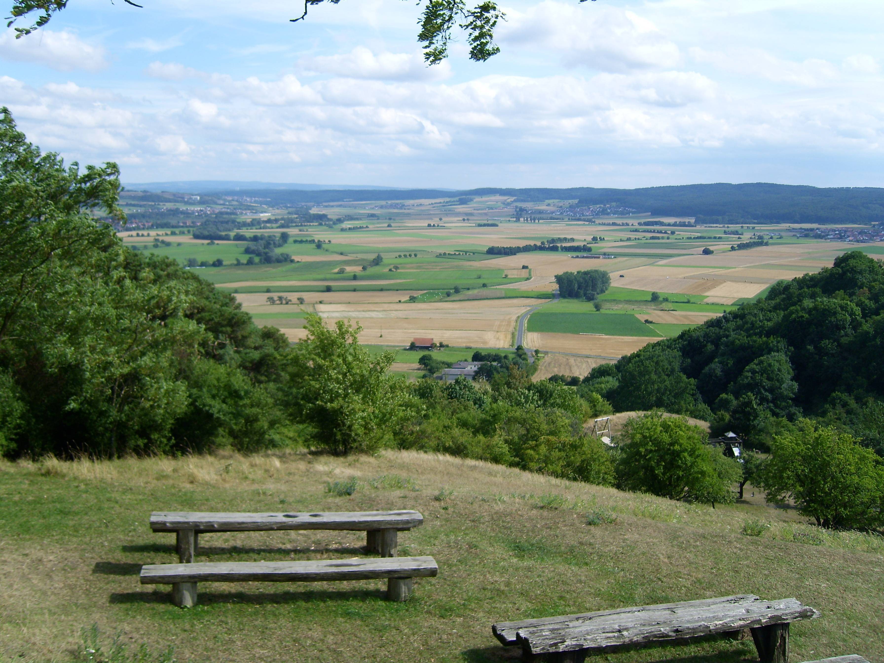 Blick von der Amöneburg auf das südöstliche Amöneburger Becken (Ohmtalsenke), den Vorderen (rechts die 405 und 407 m hohe Mardorfer Kuppe) und den "eigentlichen" Vogelsberg. Vor dem Vogelsberg ist das Basaltwerk Nieder-Ofleiden am Hang des 358 m hohen Hochberges (Nördliches Vogelsberg-Vorland) zu erkennen, rechts davon Homberg (Ohm).